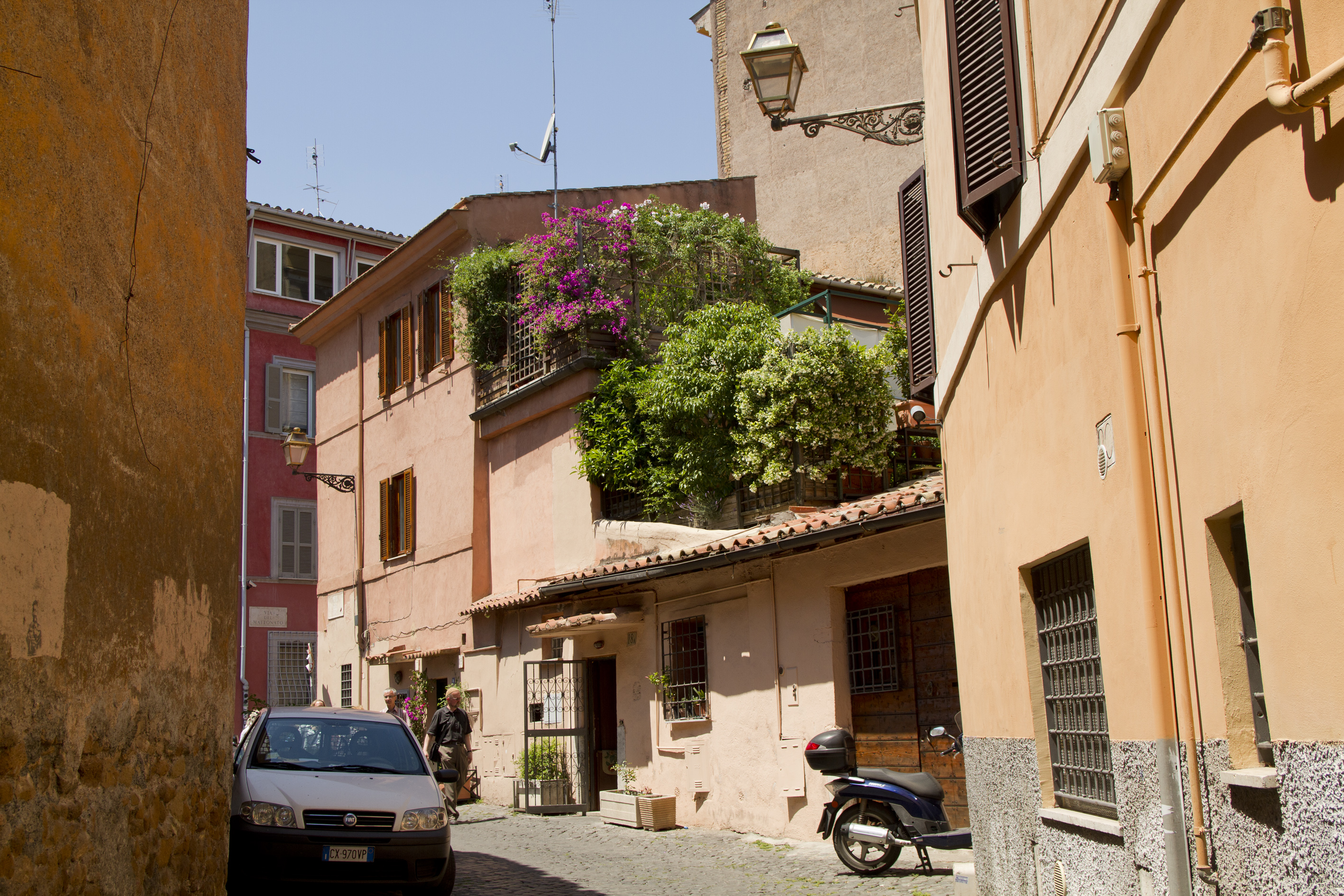 Vicolo del Cedro, Trastevere, Rome, Lazio, Italy